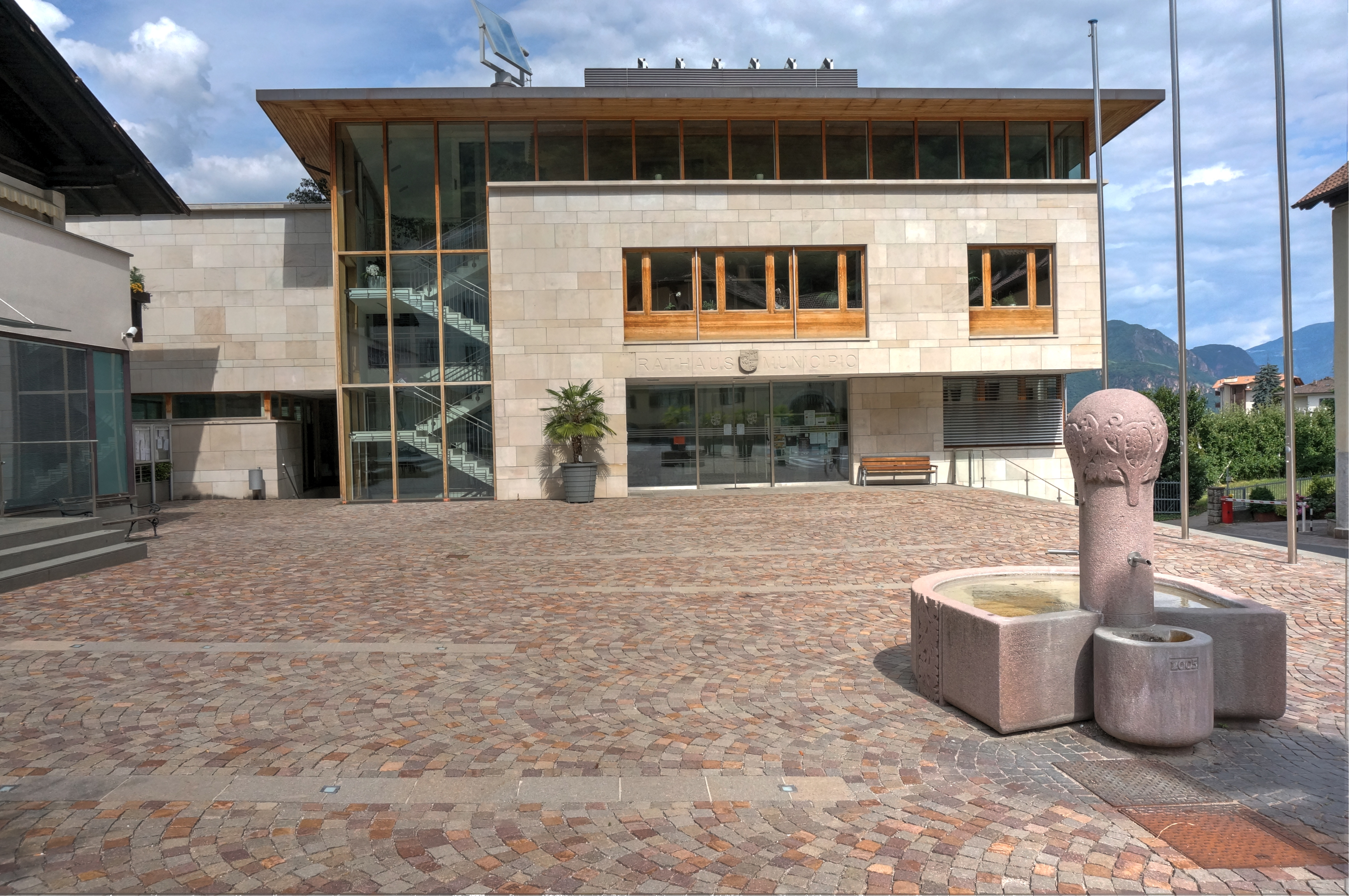 Italien, Südtirol, Nals, Rathaus am Rathausplatz 1